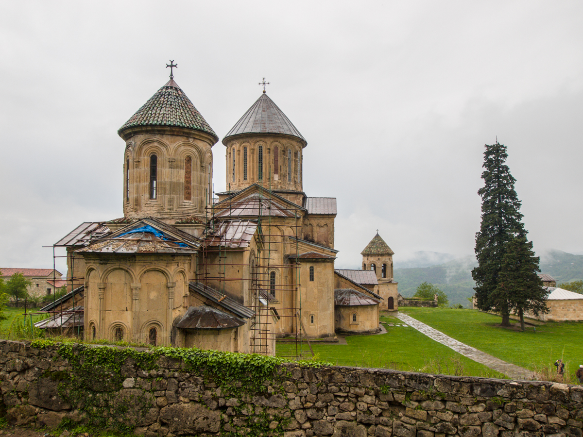 Гелатский монастырь, Грузия